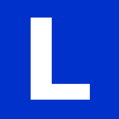 Symbol Lernfahrer in der Schweiz und in Österreich